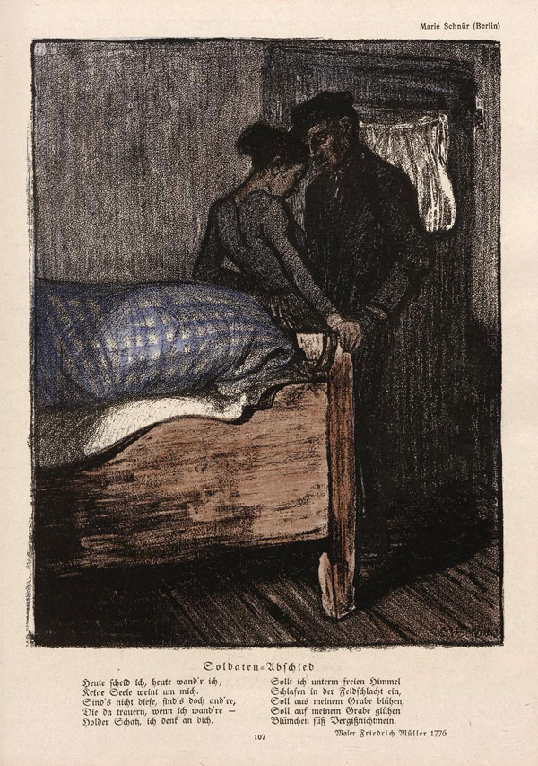 "Heute scheid ich, heute wand'r ich" (song illustration)